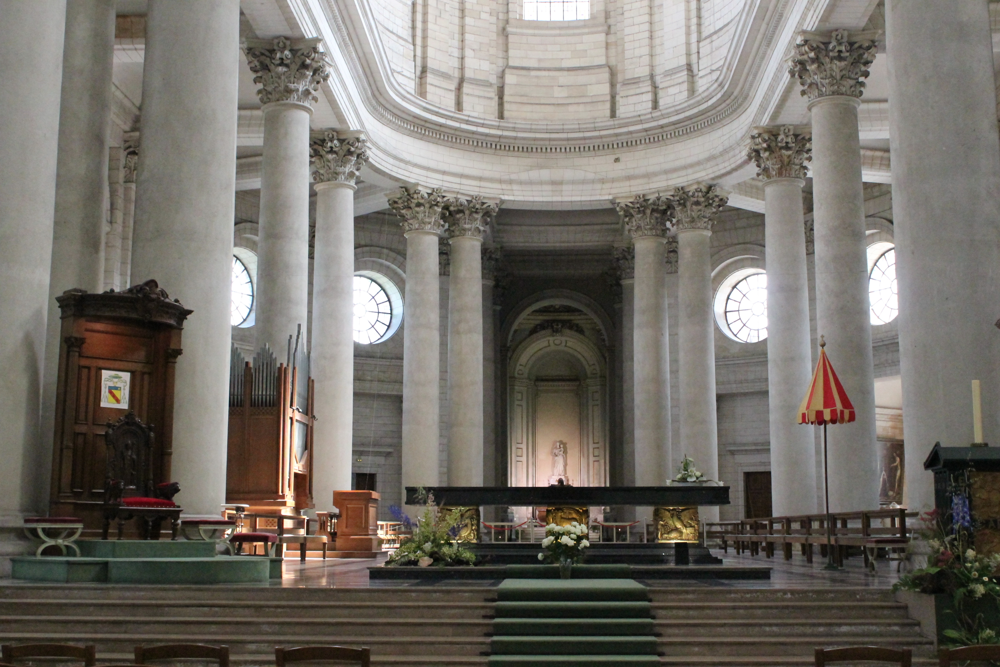 Arras (62) La cathédrale